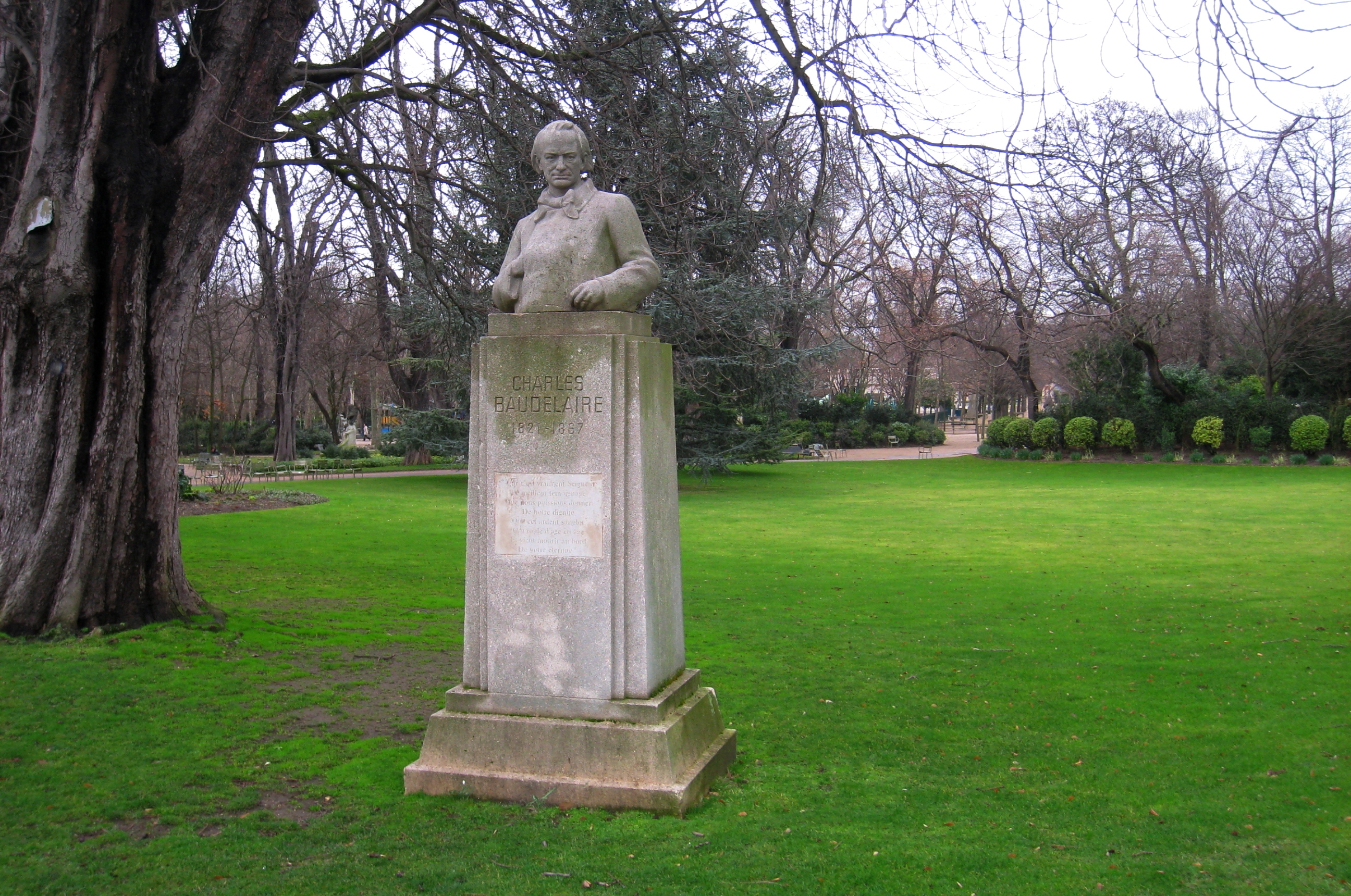 Statue of Charles Baudelaire - Jardin du Luxembourg - Paris, France.